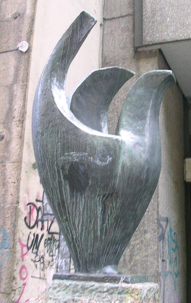 Aachen, Schinkelstraße, Denkmal am Reiffmuseum (Architekturinstitut der RWTH Aachen); Künstler: Helmut Schepp, 1962/63